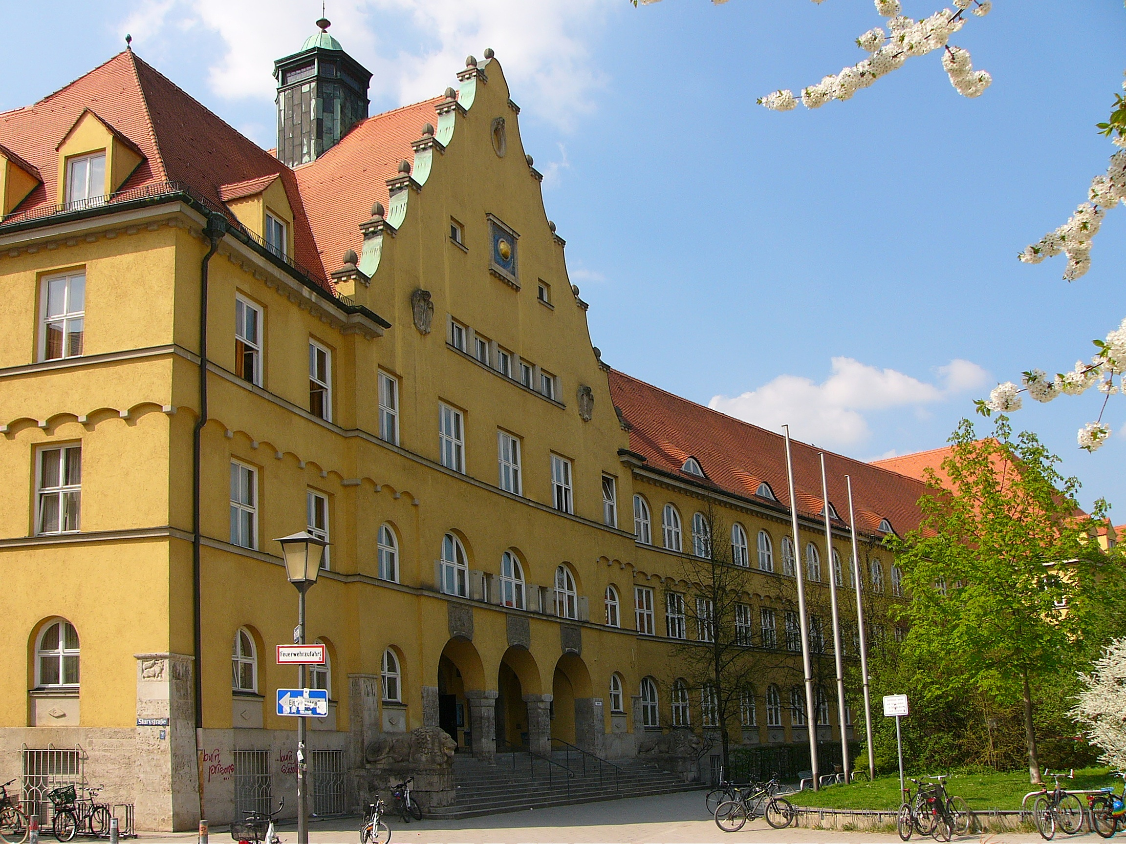 Maximiliansgymnasium; historisierender Gruppenbau mit plastischem Schmuck, 1911–12 von Karl Hoepfel; bildet ein großes Geviert mit dem Oskar-von-Miller-Gymnasium (siehe Siegfriedstraße 22); im Hof Jugendstilbrunnen; den Hof schließt nördlich eine Arkadenmauer mit Tor, darauf Figur der römischen Wölfin. This is a photograph of an architectural monument.